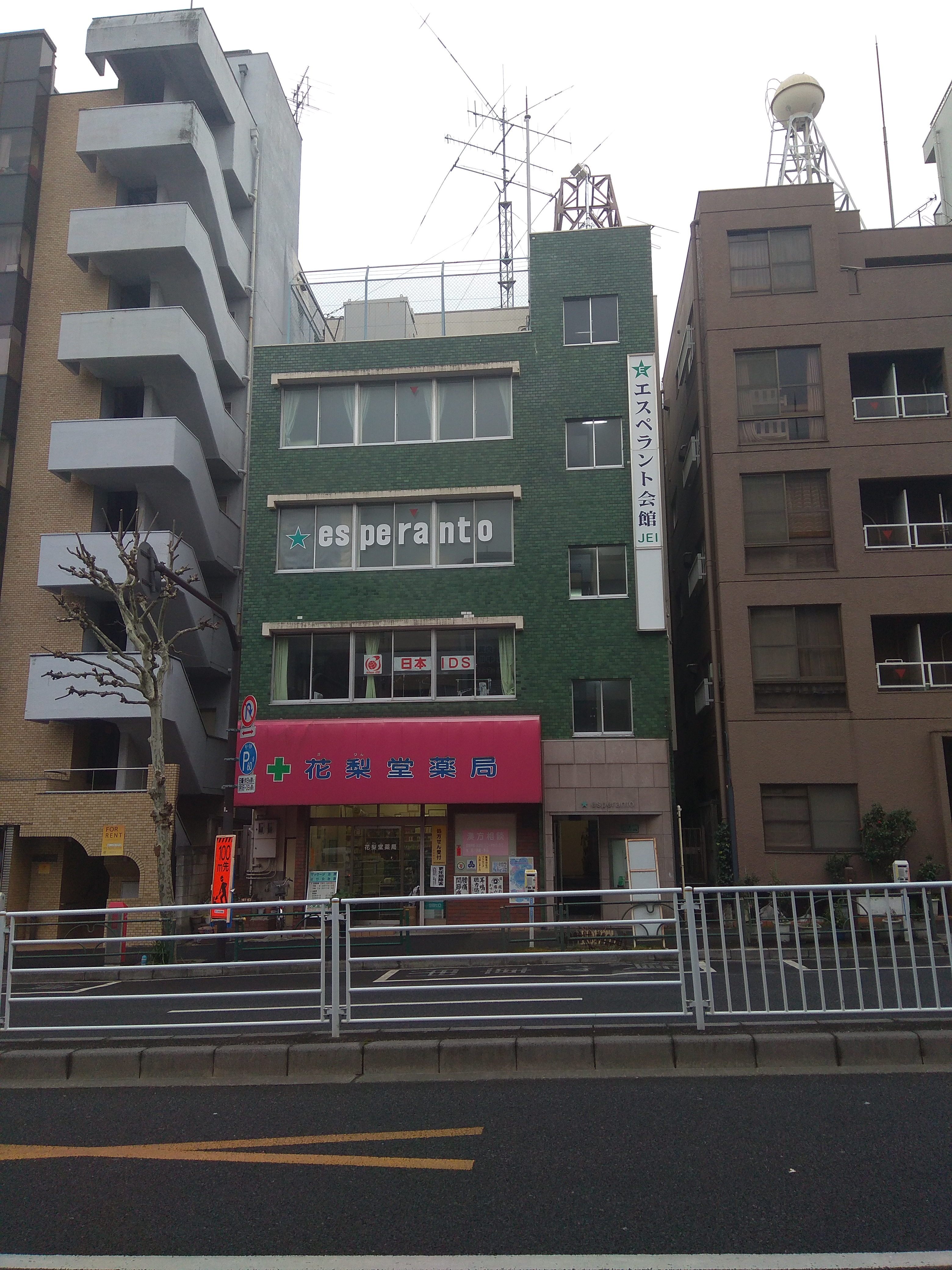 Vido de la verda konstruaĵo kie estas JEI